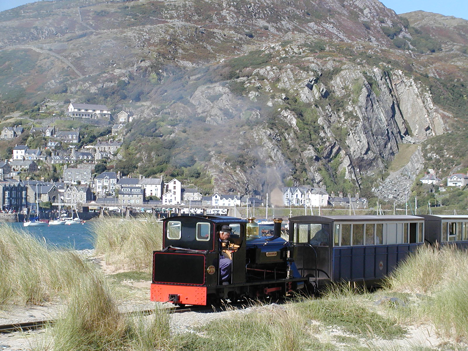 Rheilffordd Fairbourne, Ffriog